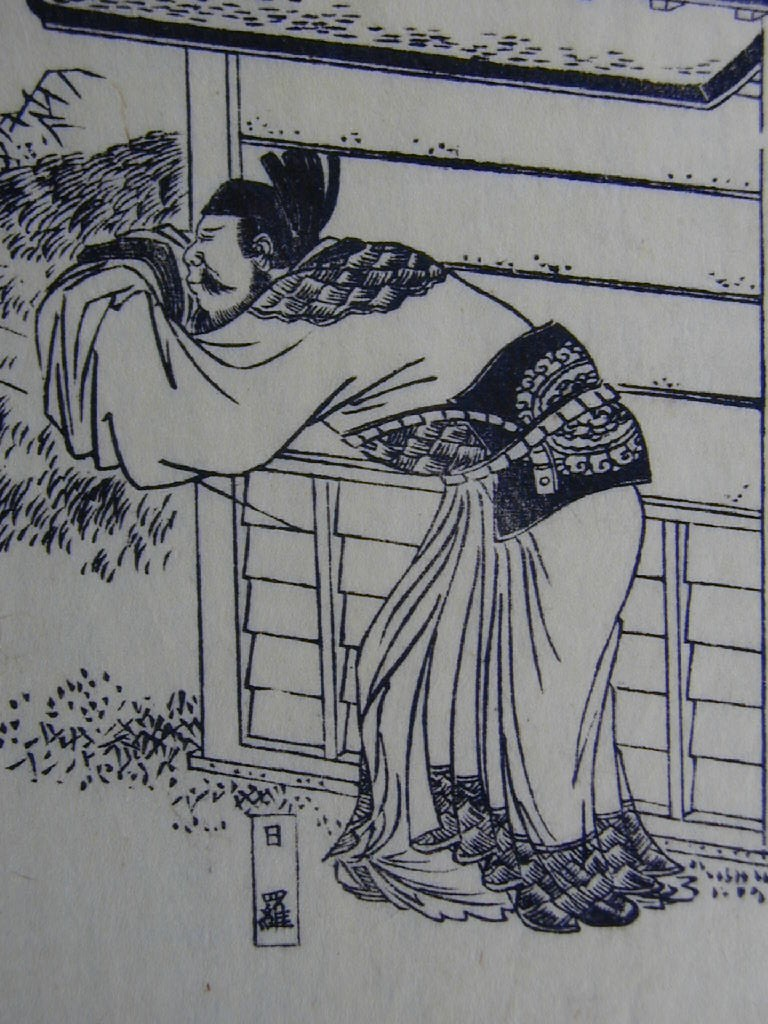 日羅